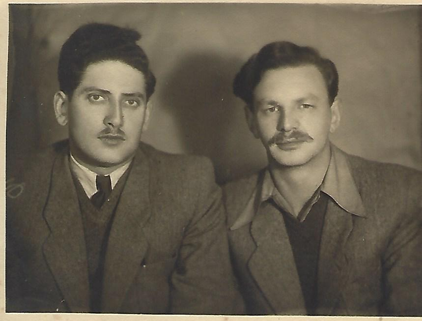 צבי נצר (משמאל) עם אנטק צוקרמן (מימין)